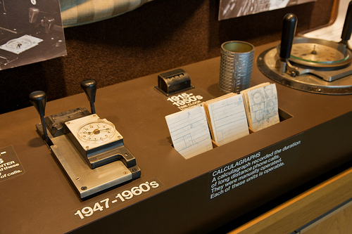 Calculagraphs